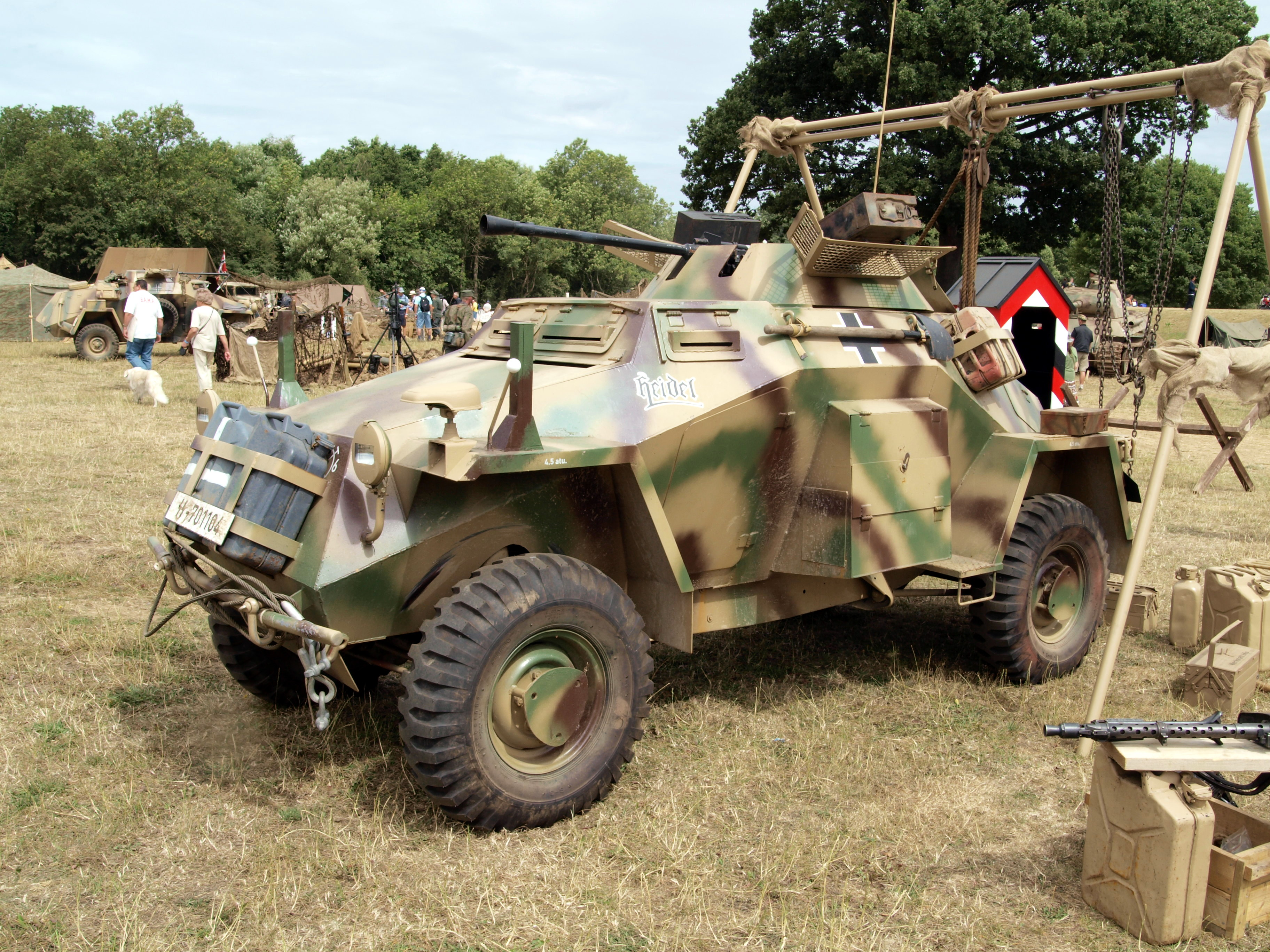 SdKfz. 222 SS-701104 Heider